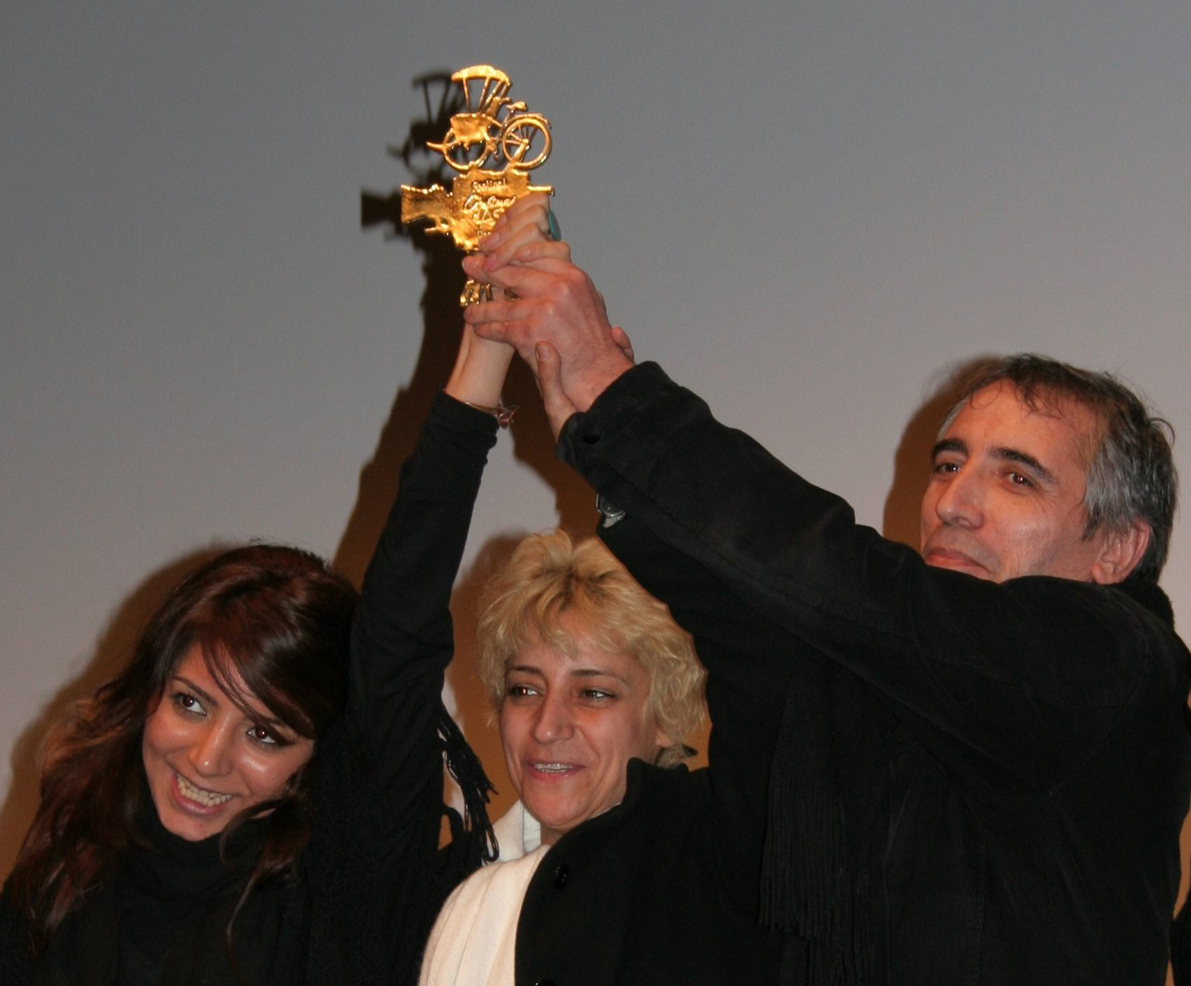 Hana Makhmalbaf, Marziyeh Meshkini, Mohsen Makhmalbaf, cyclo d'or au festival international des cinémas d'Asie de Vesoul en 2009.